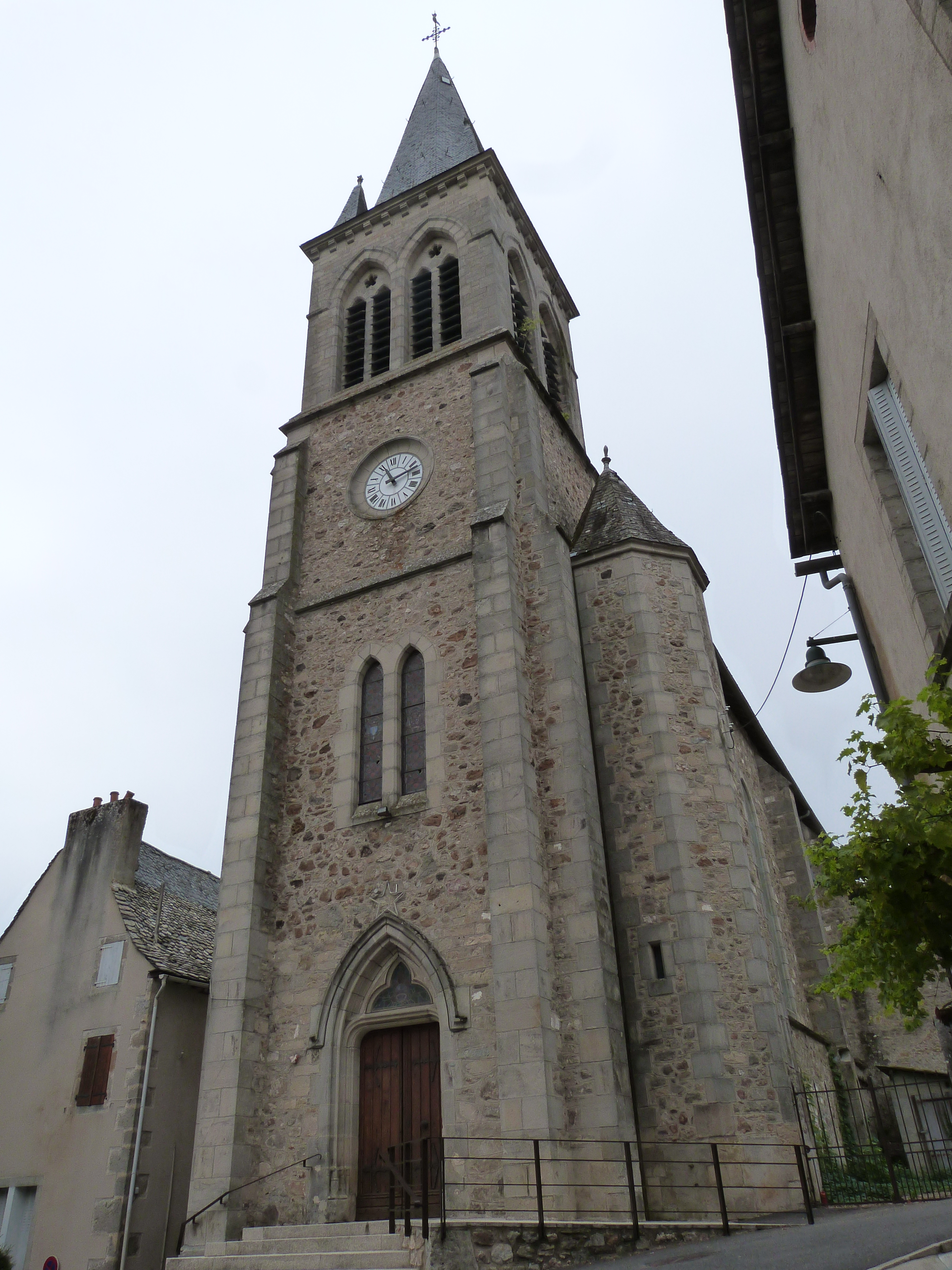 Eglise de La Fouillade